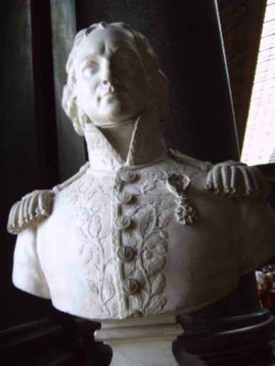 buste de Jean Louis Debilly, galerie des batailles du château de Versailles, Yvelines, France.